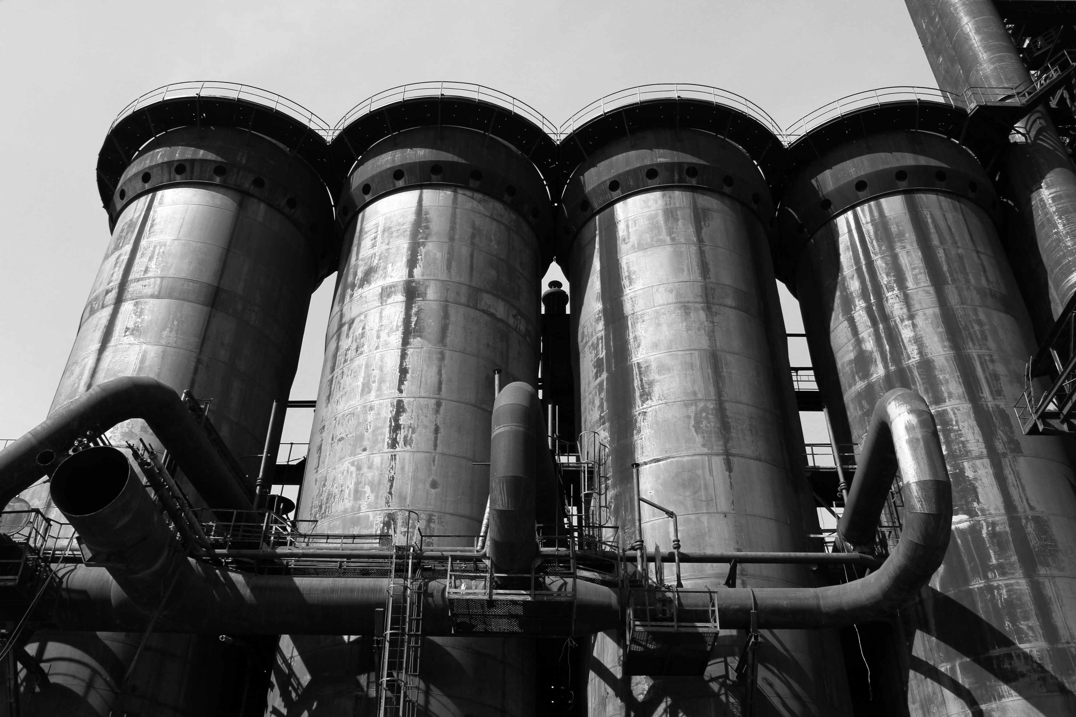 Železárna - koksovna a vysoké pece Vítkovice se souborem technického vybavení, s omezením: bez části pozemku pův. označeného parc. č. 1051/1 (Ostrava), Ostrava